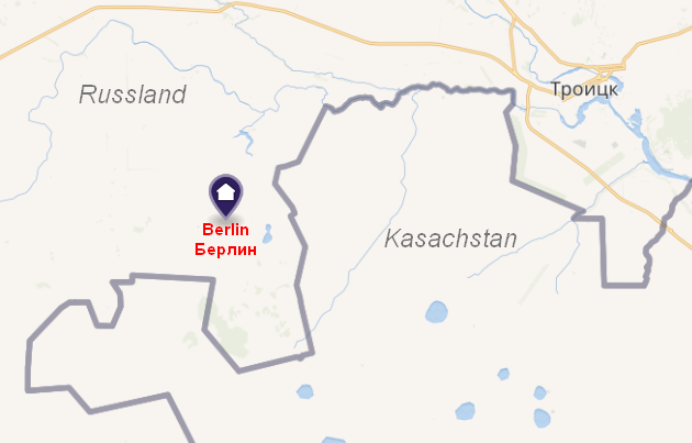 Lage Berlins an der Grenze zu Kasachstan